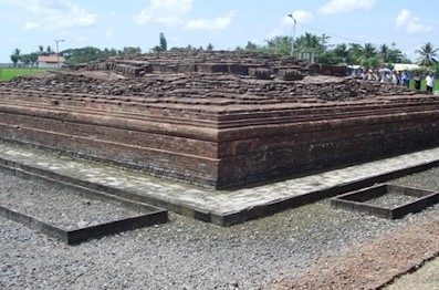 Temple at Batujaya site, West Java, Indonesia